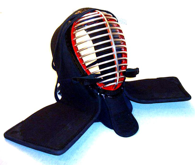 Kendo Men